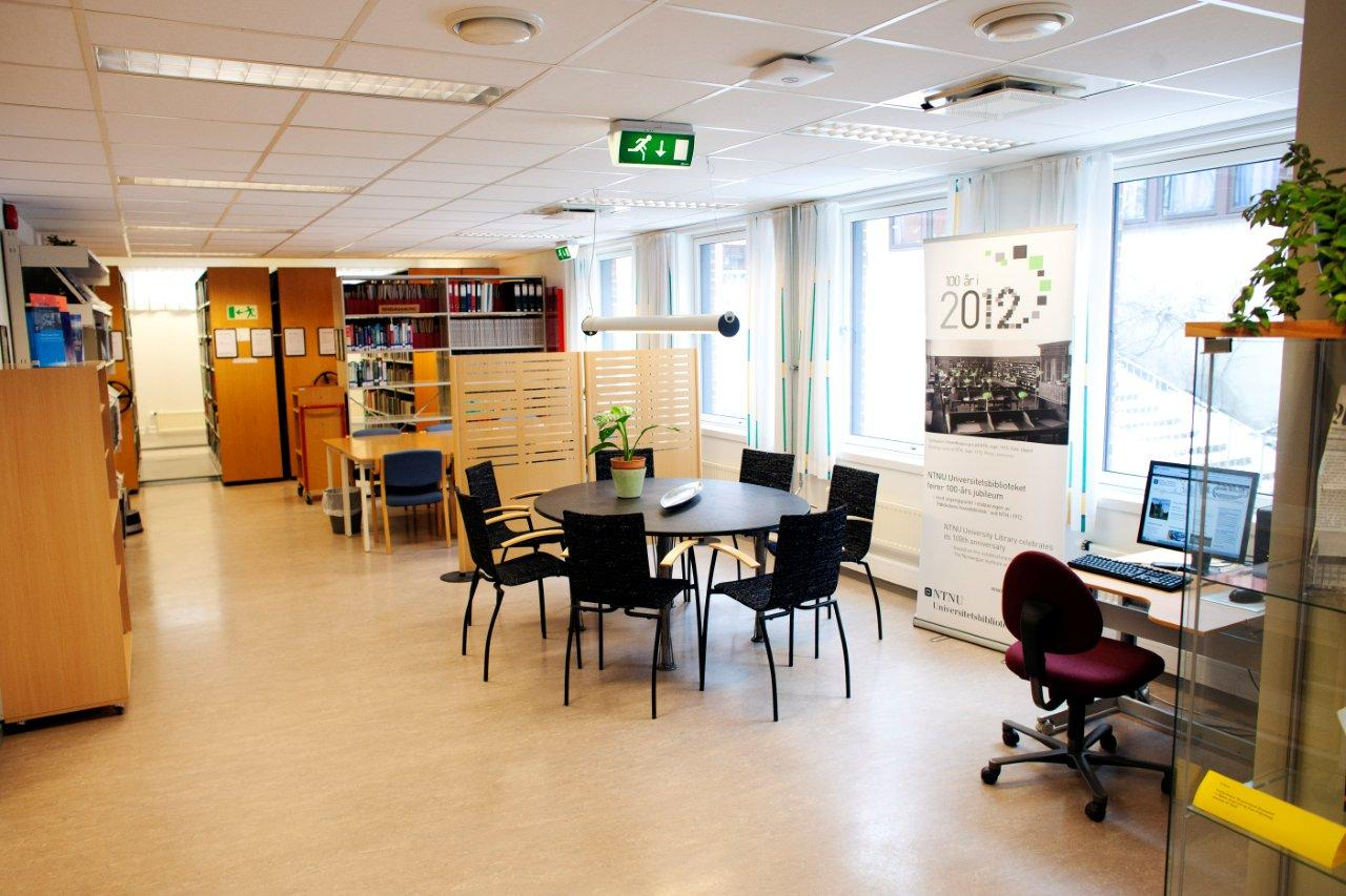 Fra Valgrinda-biblioteket; et av 11 bibliotek ved NTNU Universitetsbiblioteket, Trondheim